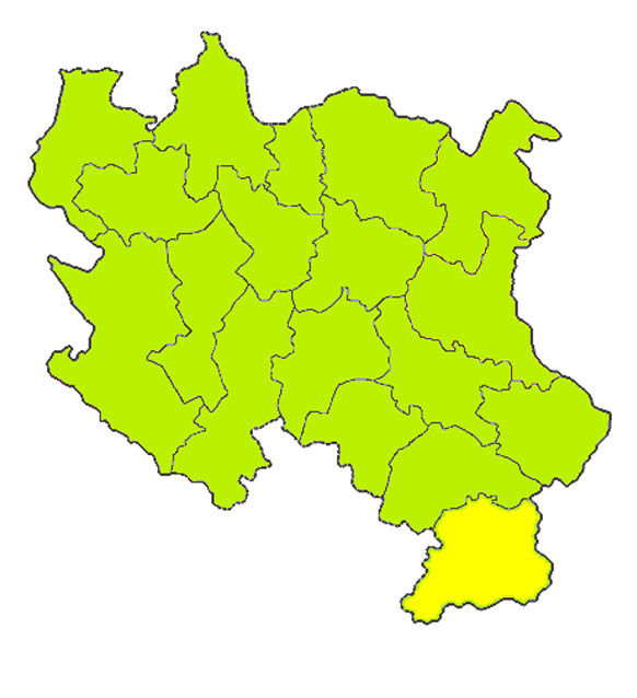 Map of Pčinja